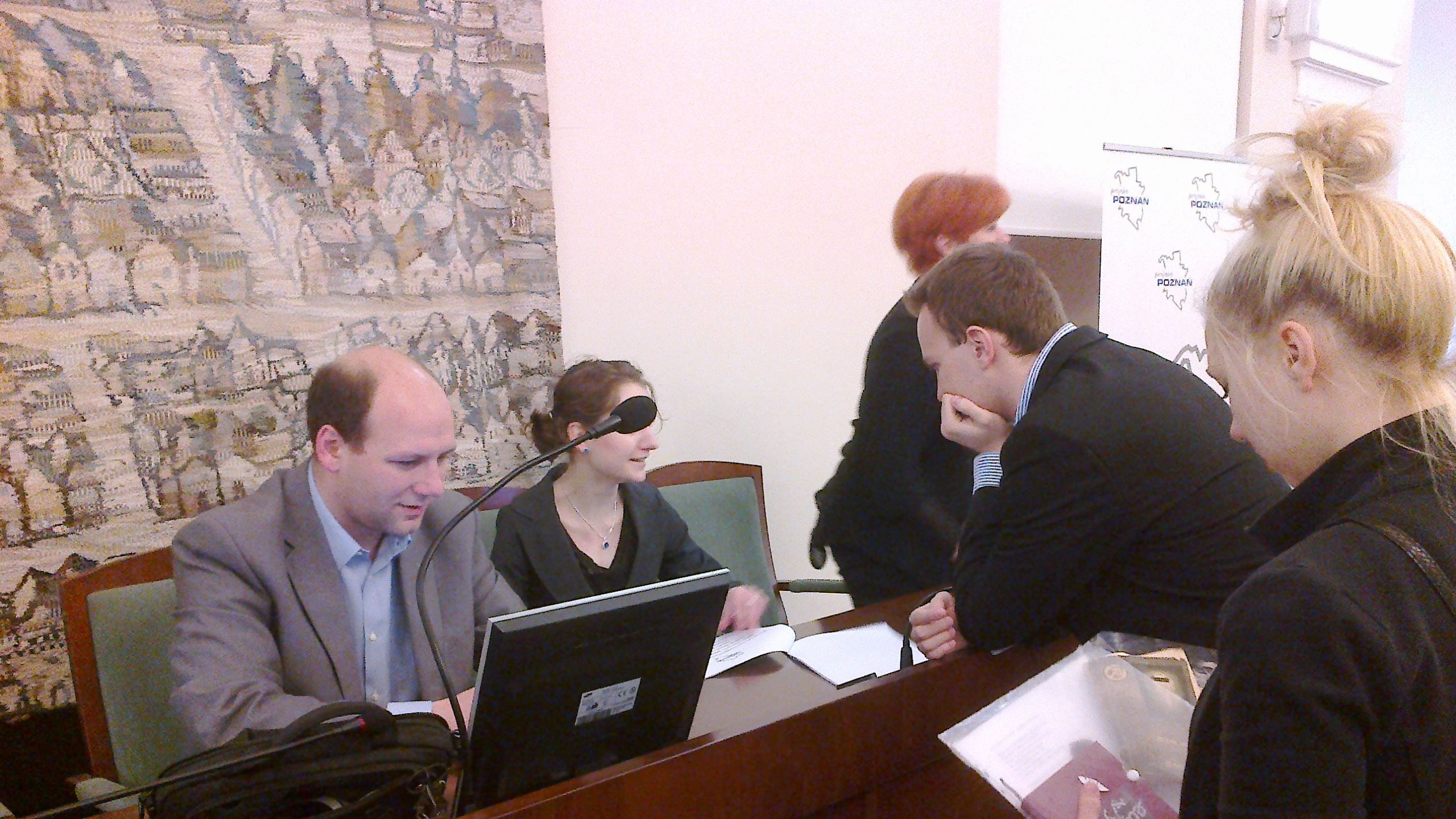 radny partii Prawo i Sprawiedliwość Szymon Szynkowski vel Sęk ze współpracownikami w trakcie spotkania na Sali Sesyjnej Urzędu Miasta Poznania